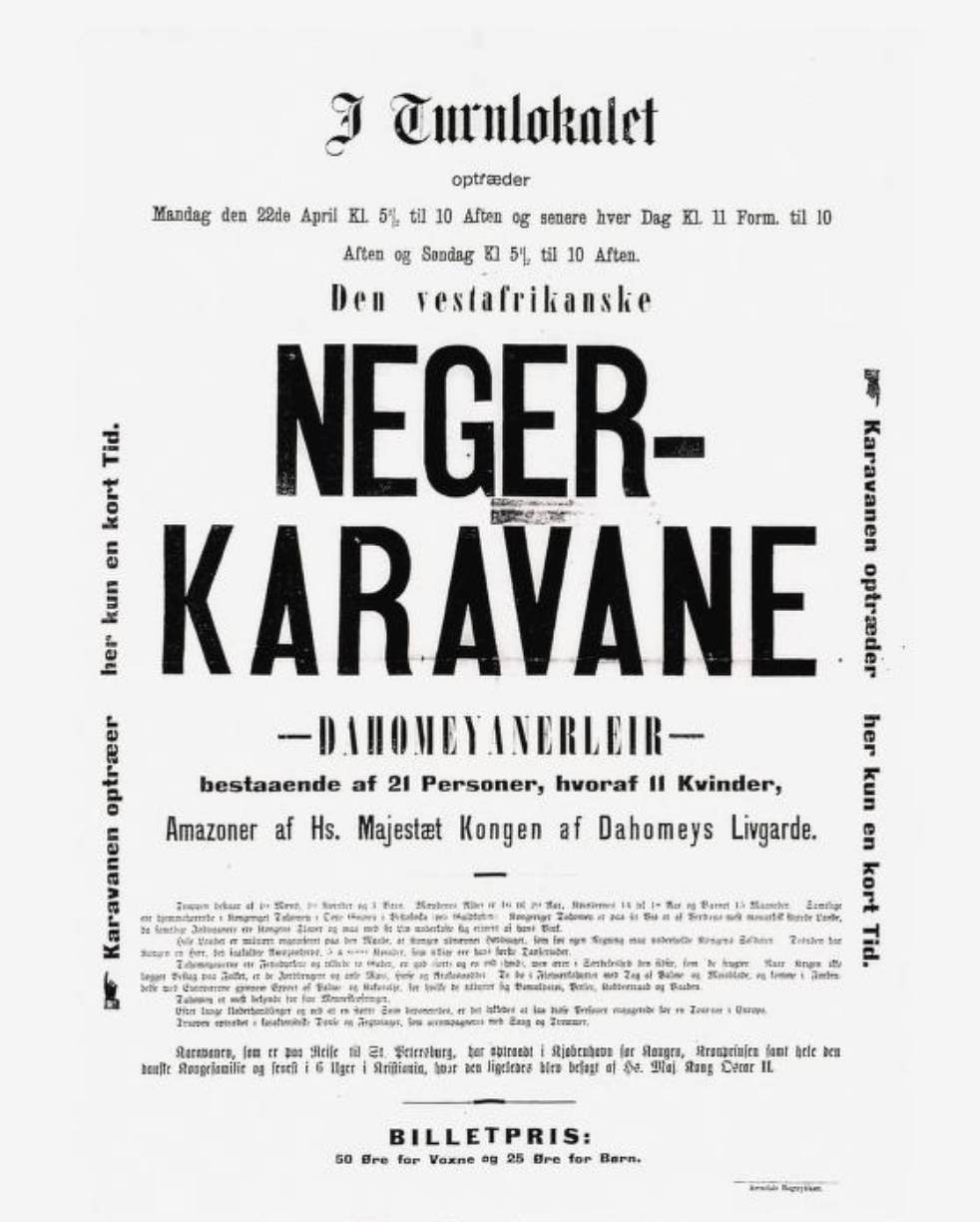 Plakat for opptreden av amasonene fra Dahomey, i Arendal